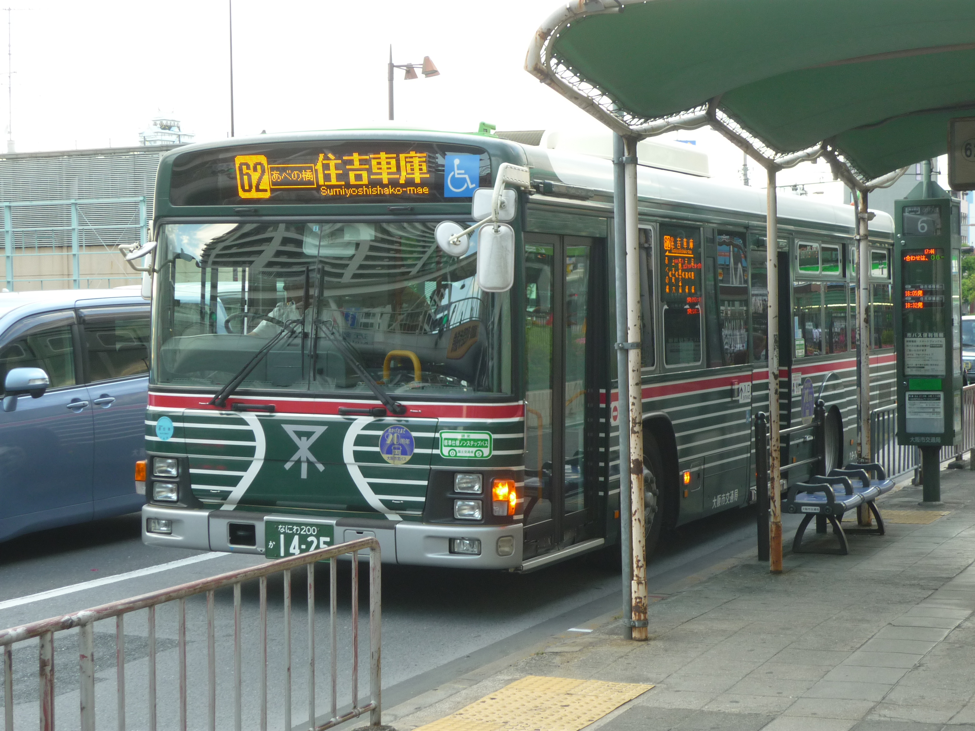 大阪市営バス住吉営業所所属車両